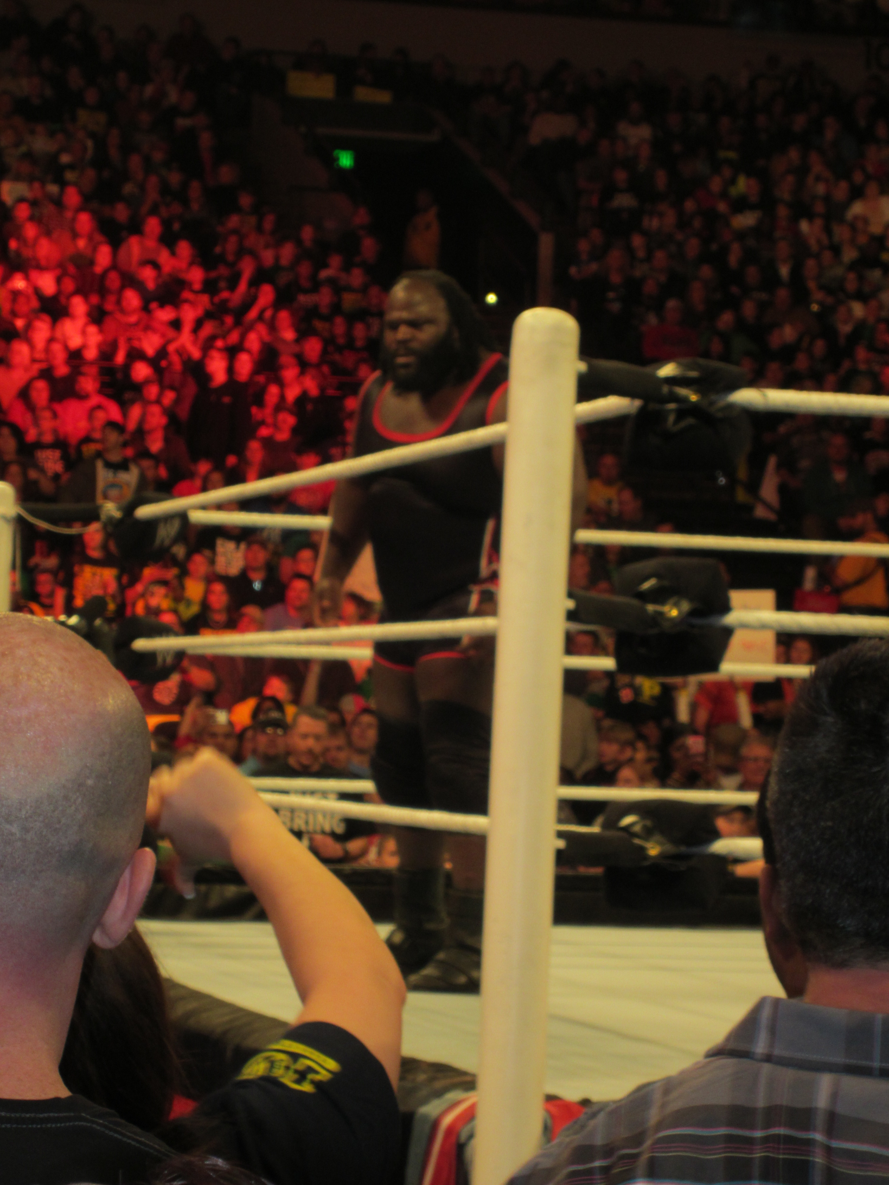 Mark Henry